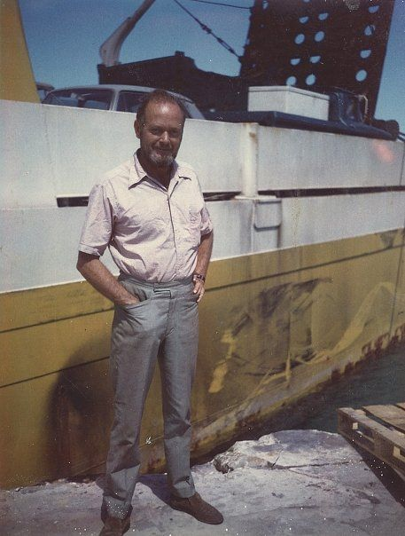 John Gynell at Exuma dock in front of the "Enrus"